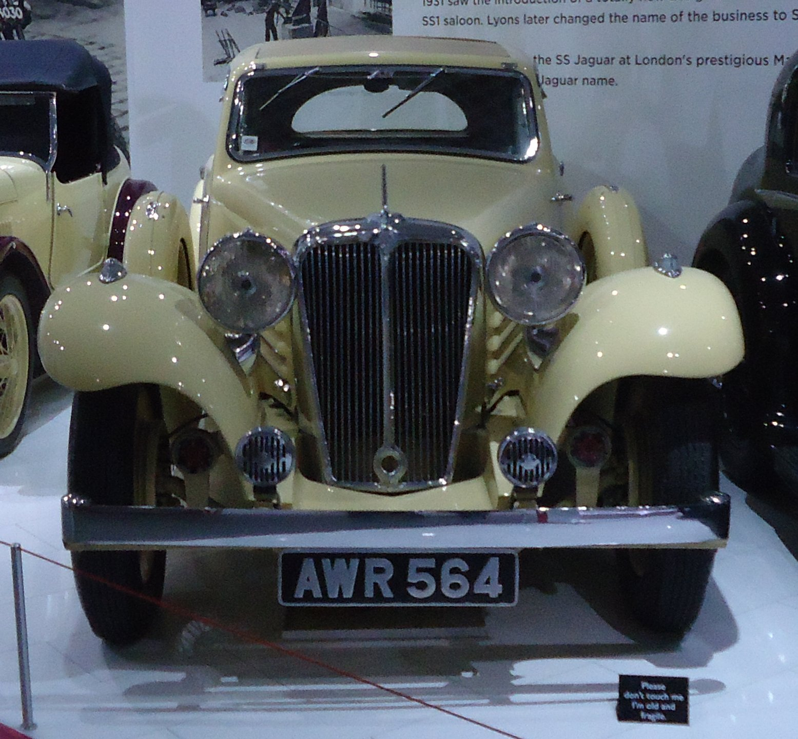 Museo del Transporte de Coventry